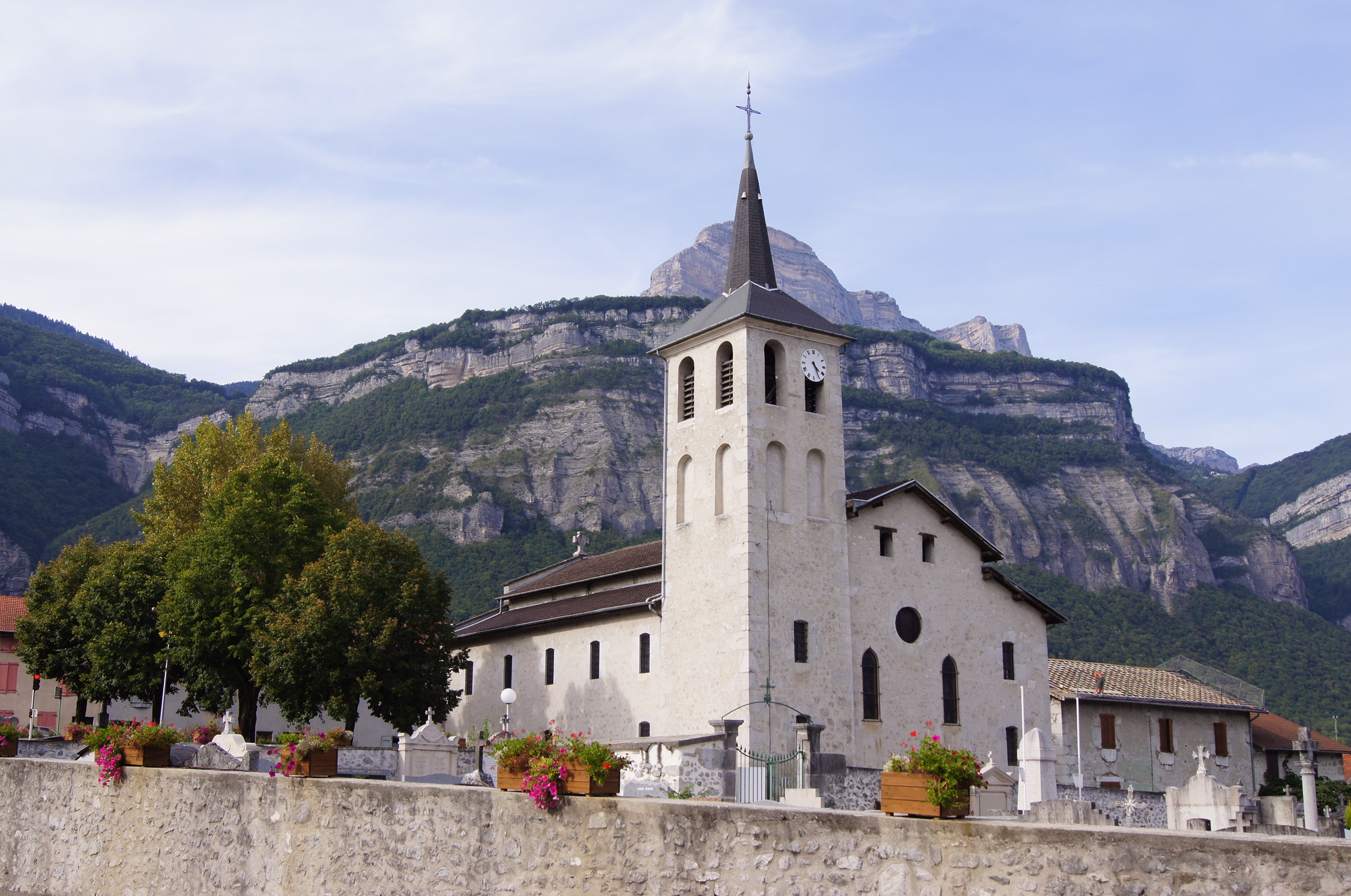 L'Eglise